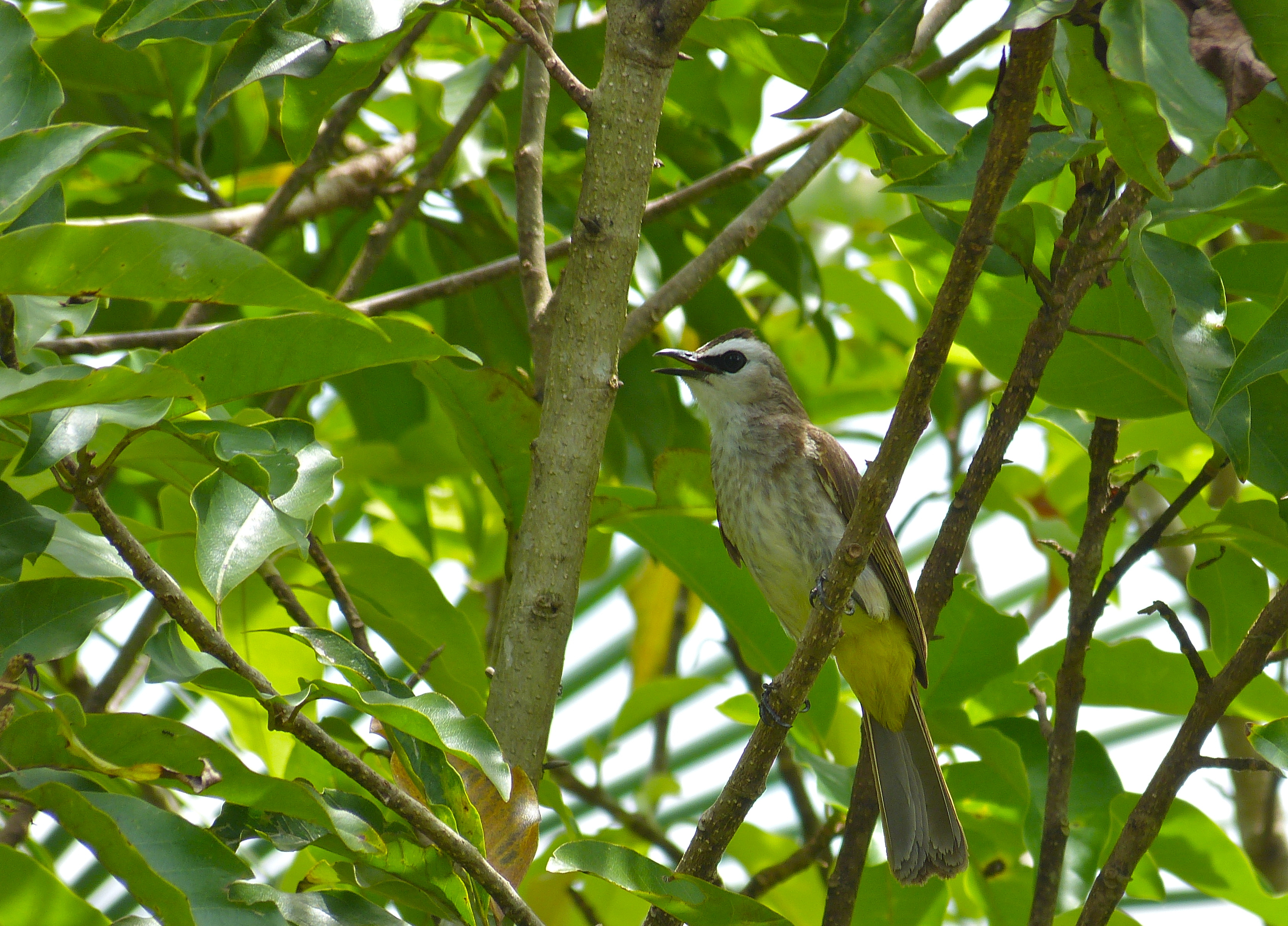 Kuala Tahan, Pahang, MALAYSIA